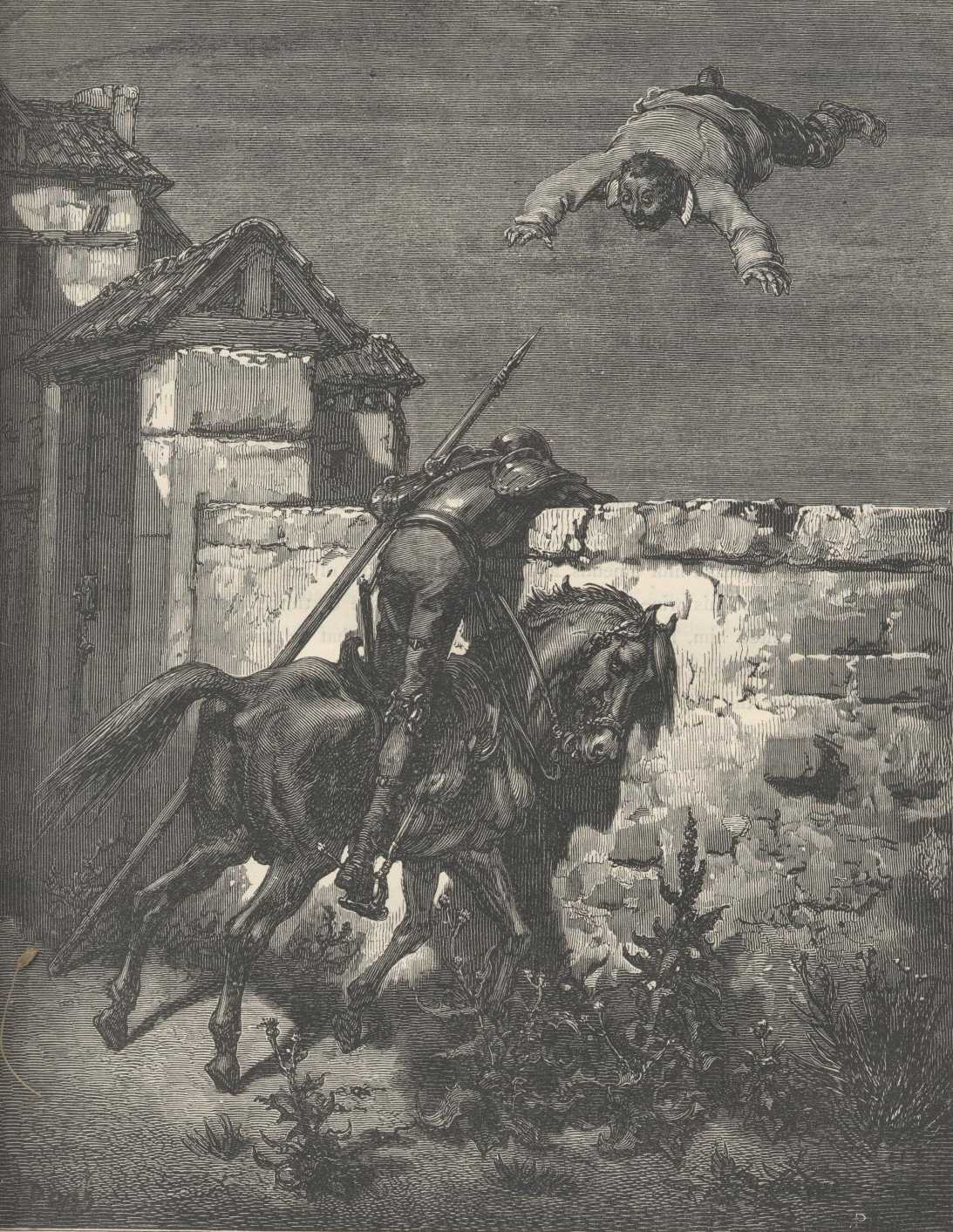 Dom Quixote ameaça os que brincam com Sancho Pança